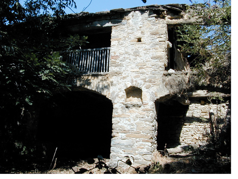 Aberturas en arco interiores orientadas al sur